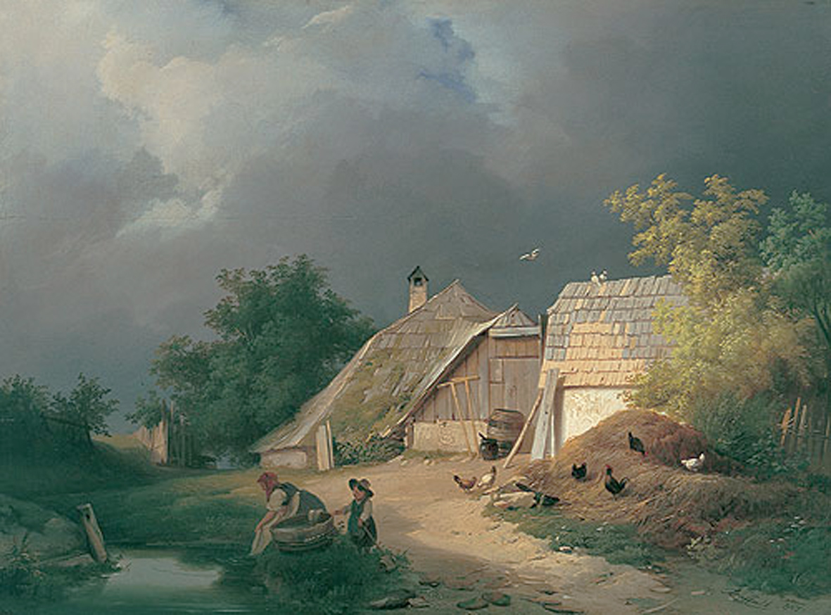 Vor dem Gewitter Before the Thundestorm